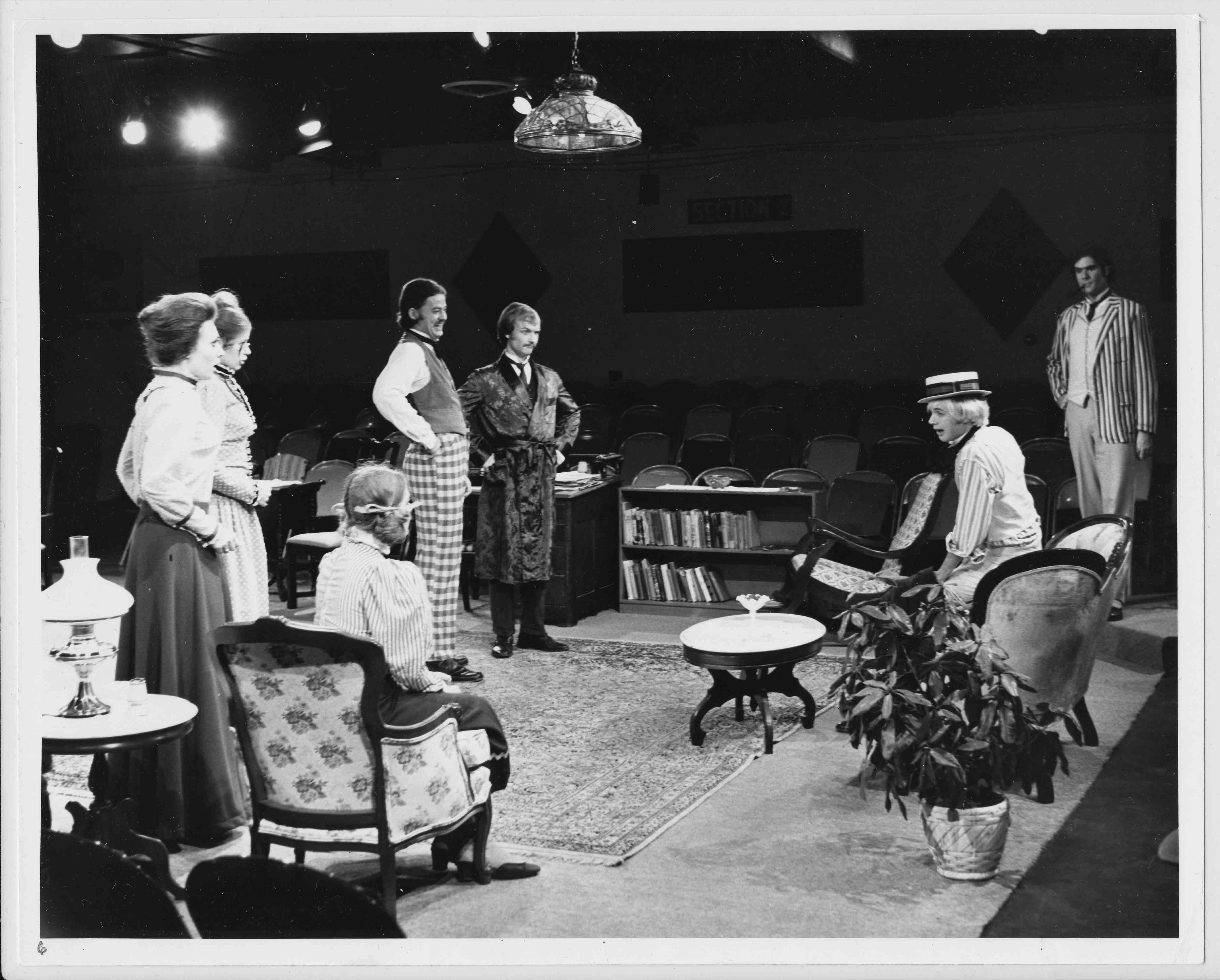 AhWilderness1